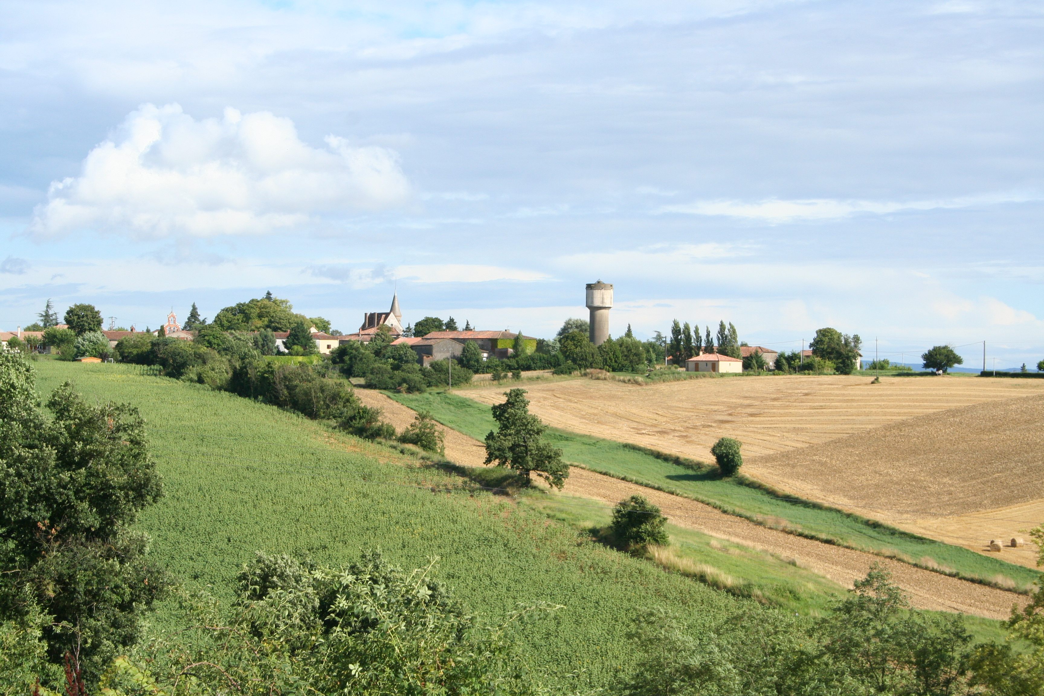 Lacroisille, village in Tarn, France.